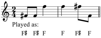 بکارگیری علائم عرضی